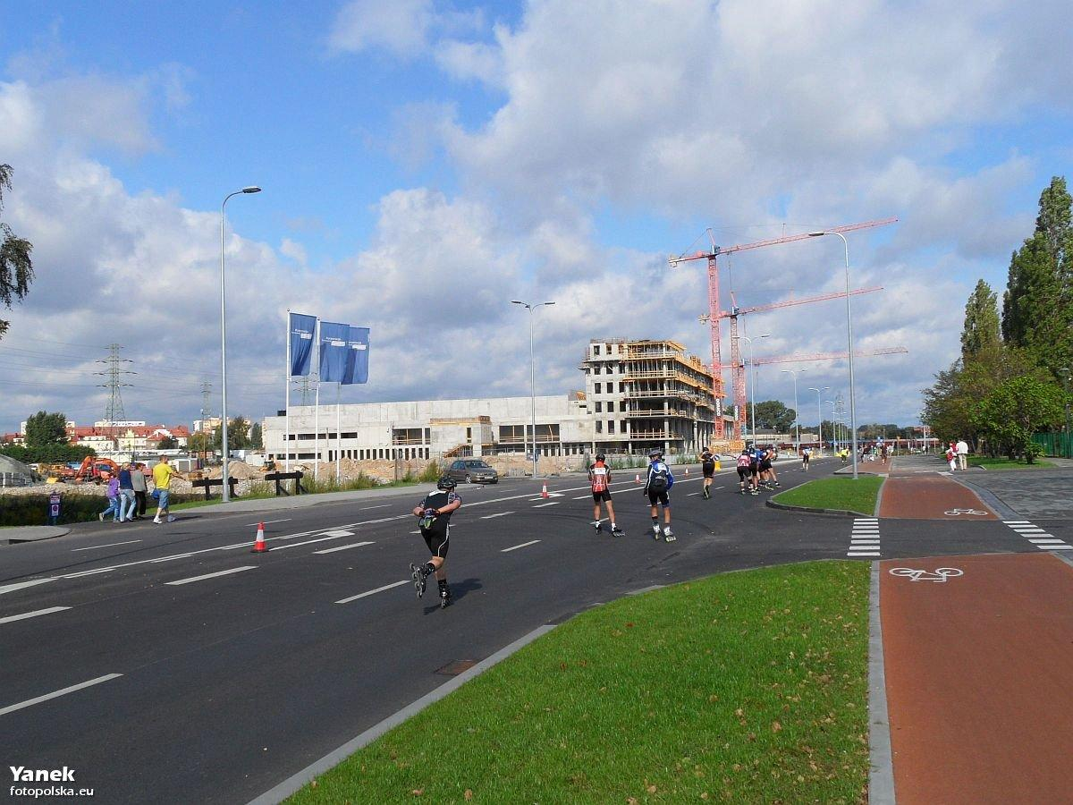 Ulica Żaglowa, prowadząca na stadion PGE Arena. Na zdjęciu zawodnicy III Maratonu Sierpniowego im. Lecha Wałęsy, rozgrywanego w ramach Pucharu Świata. W tle budowa Amberexpo.